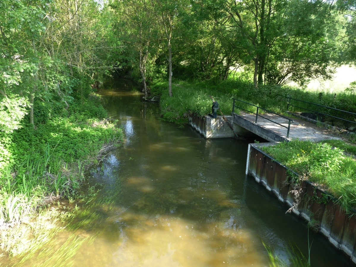 Le Beau à St-Médard (Charente, France); vue aval